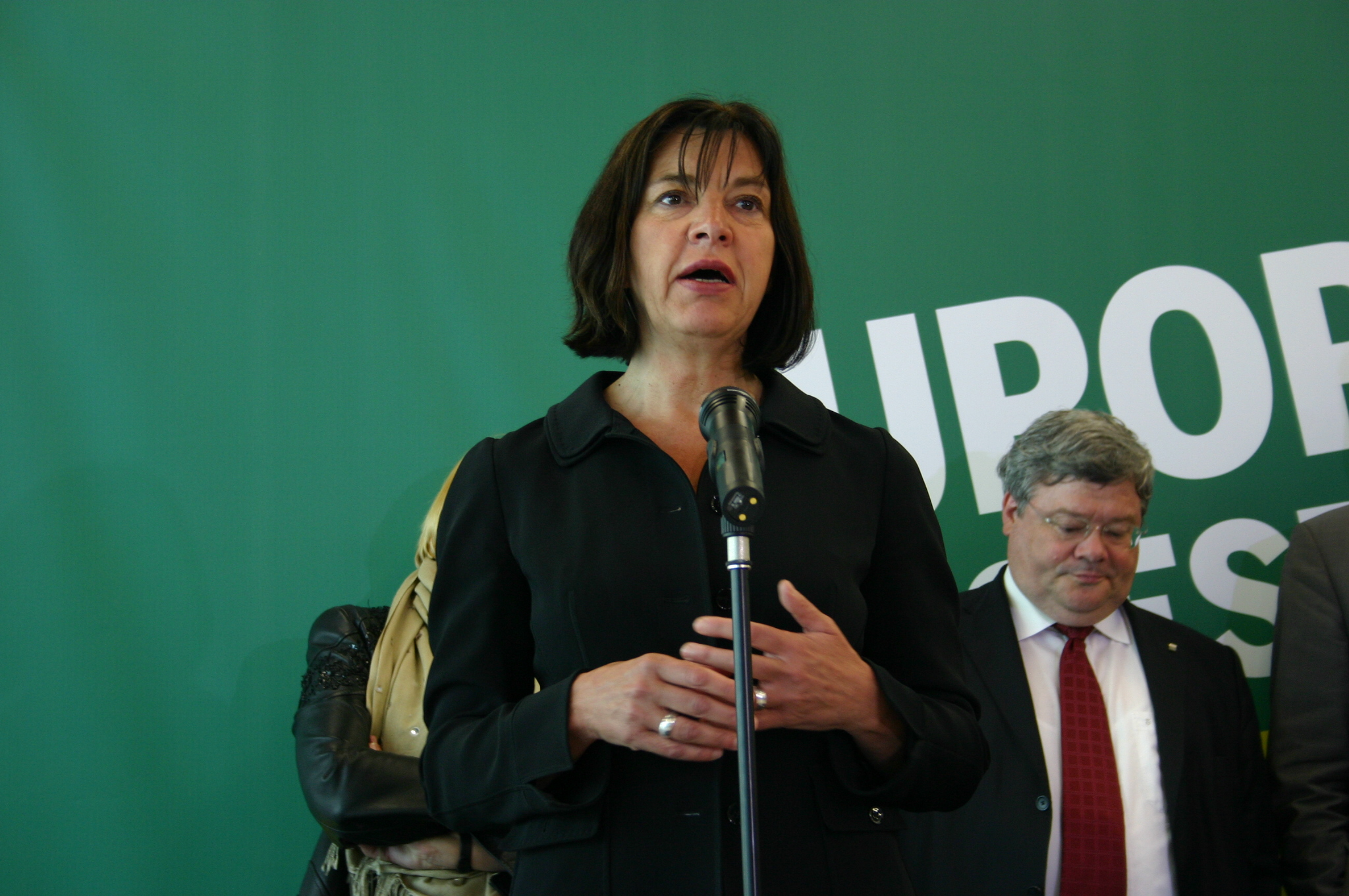 Rebecca Harms bei einer Veranstaltung von Bündnis 90/Die Grünen im Anschluß an die Europawahl 2009